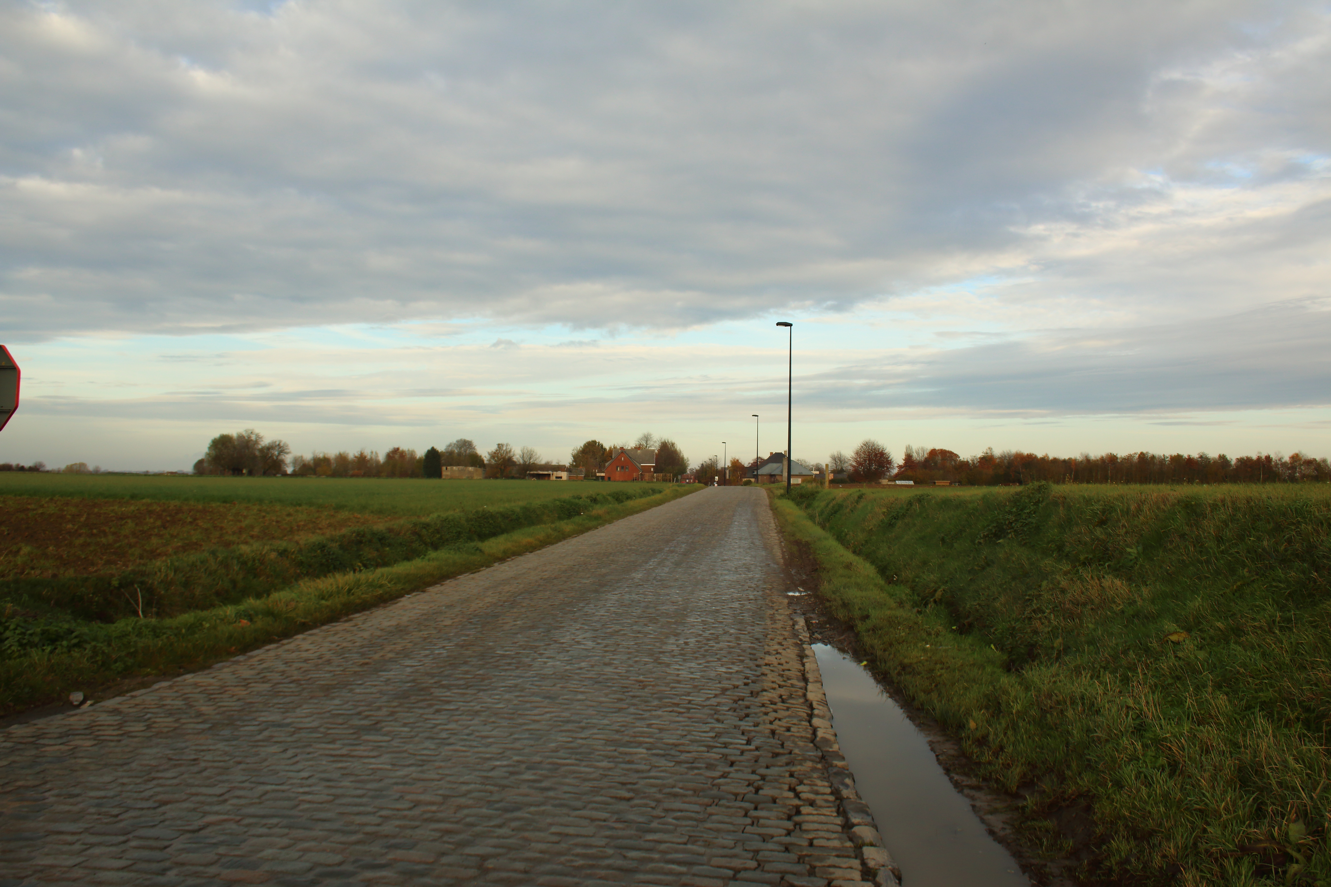 Karel Martelstraat, Mater, Oudenaarde, Vlaanderen, België